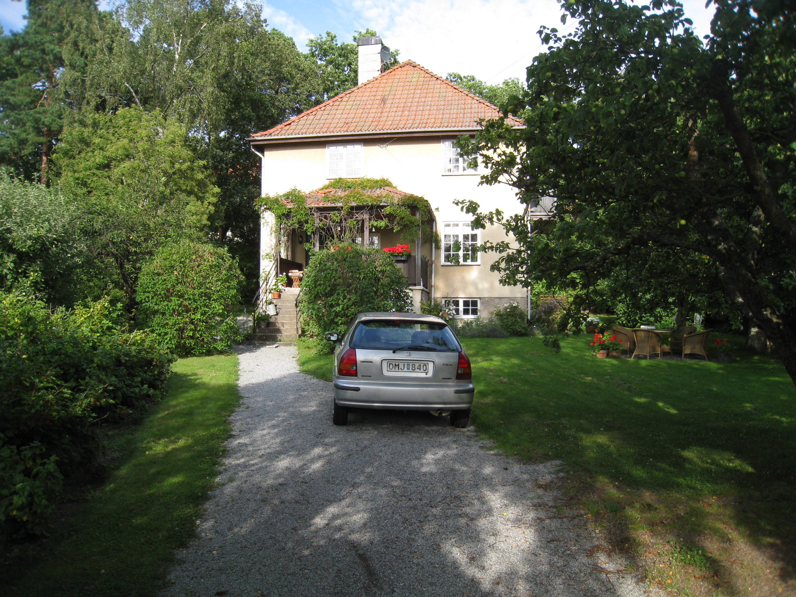 Villa i Äppelviken, Bromma, väster om Stockholm.